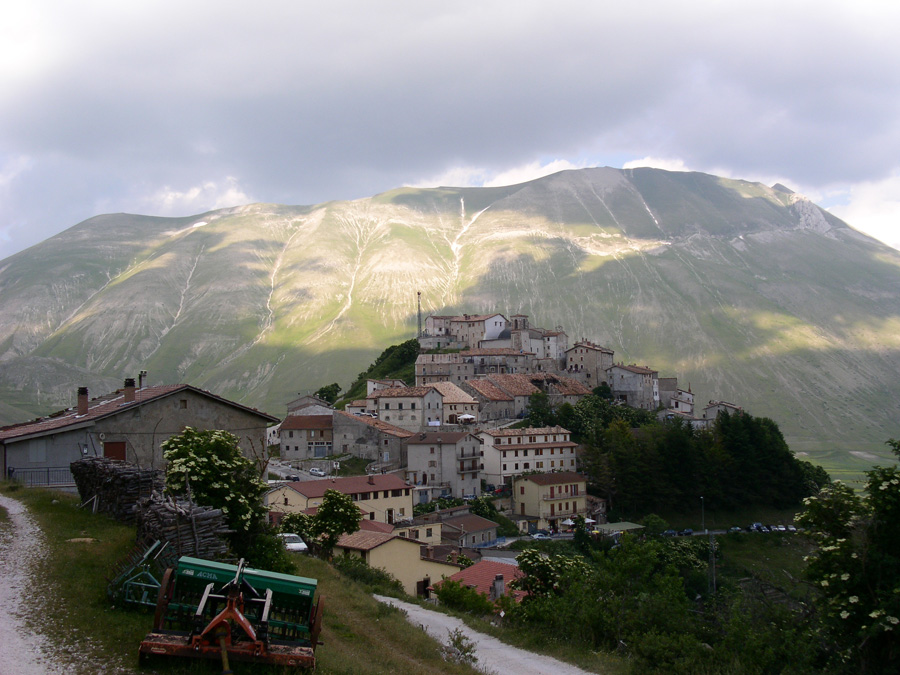 fotografia di Castelluccio di Norcia con alle spalle il massiccio del Monte Vettore